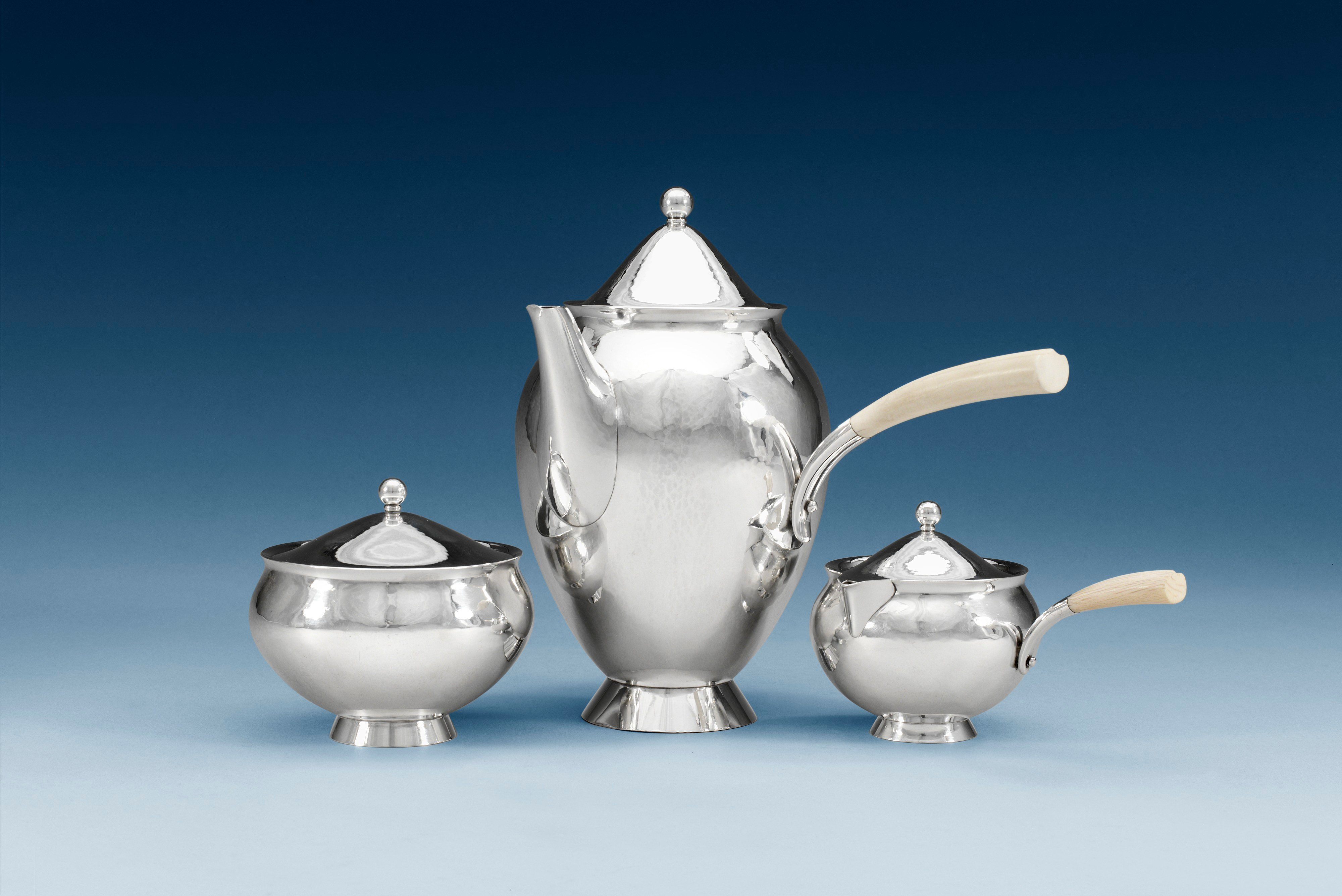 harald Nielsen silver